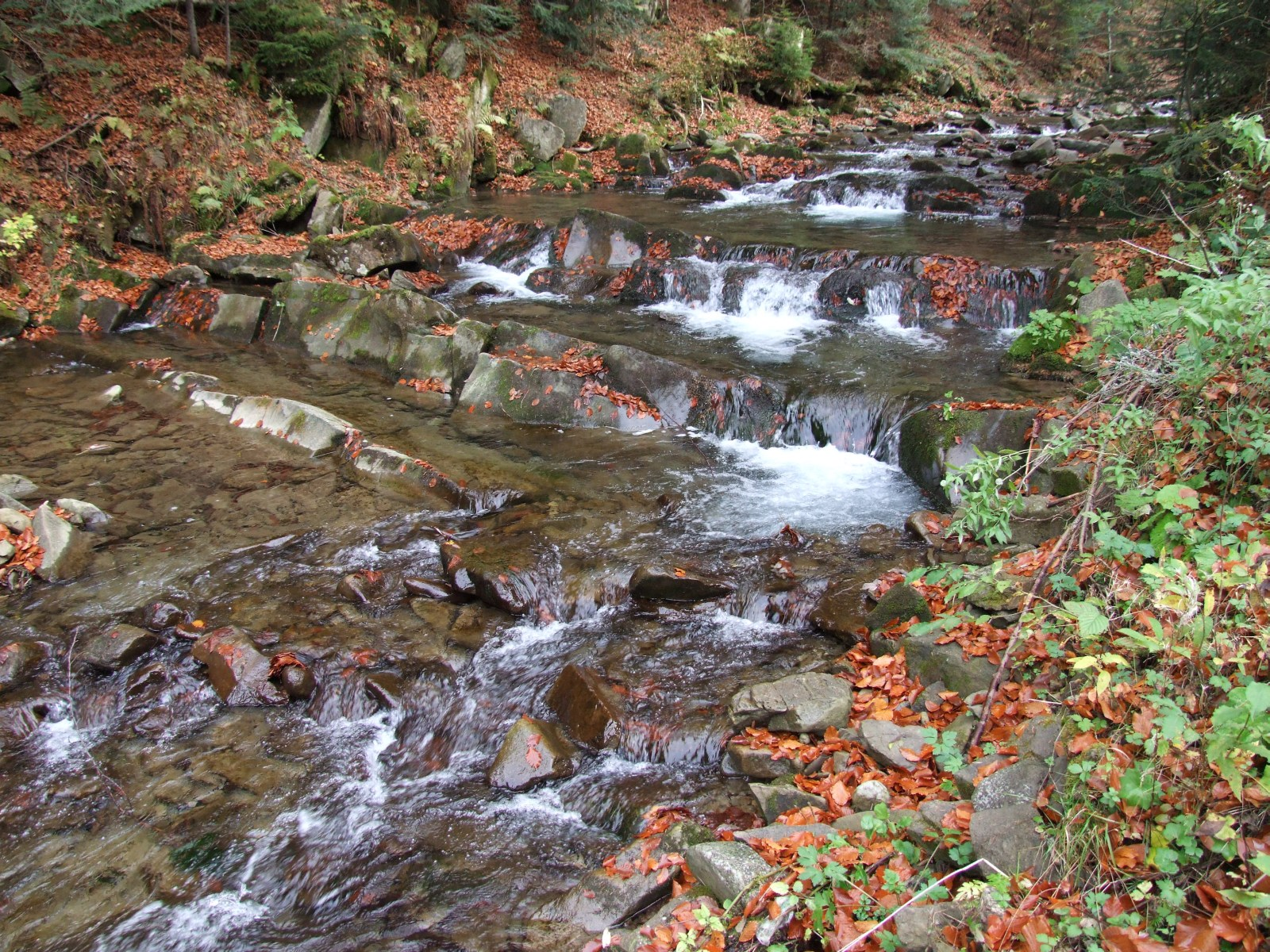 Potok Konina w Gorcach